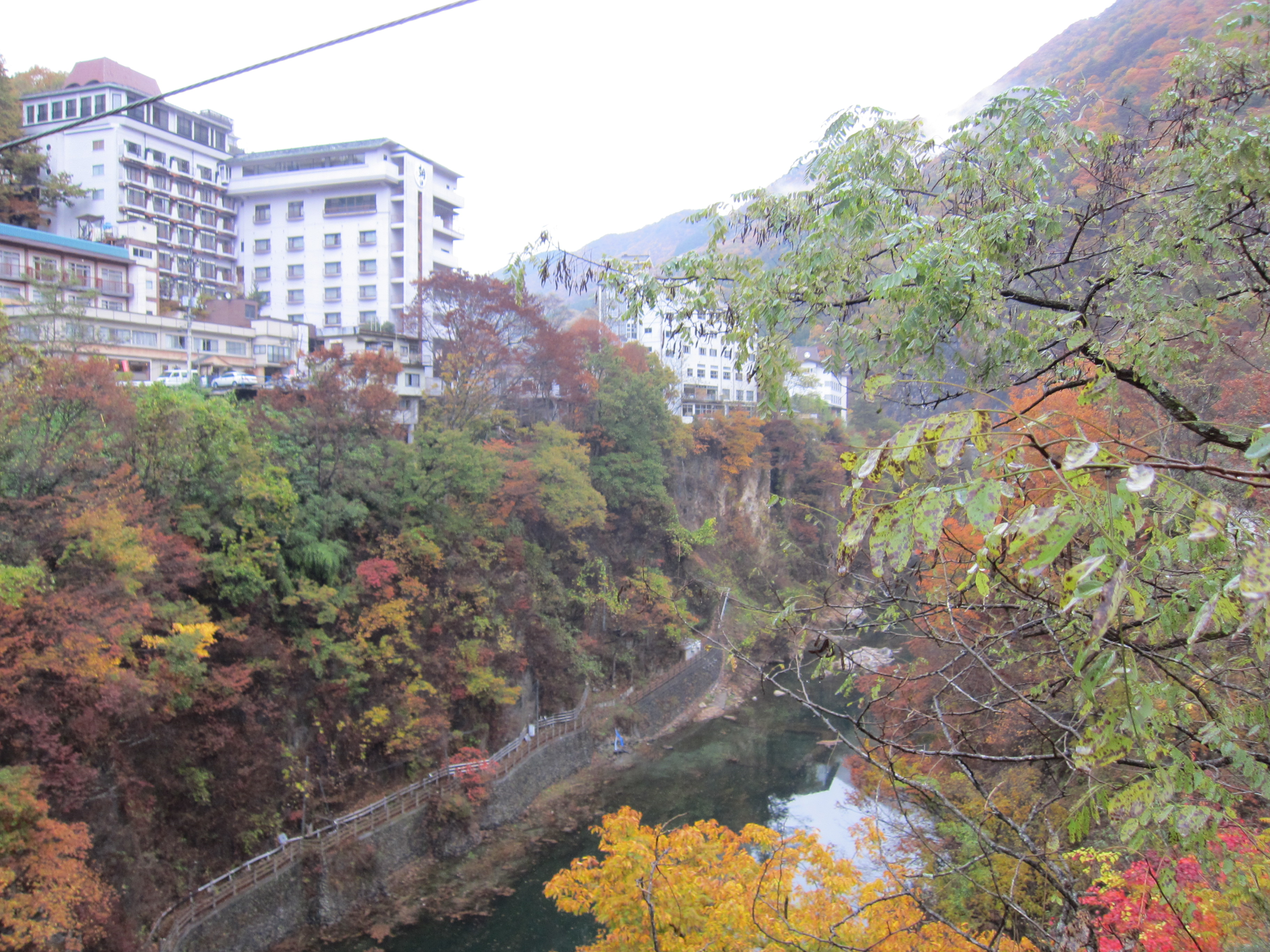 日本 群馬県沼田市利根町 紅葉の老神温泉郷